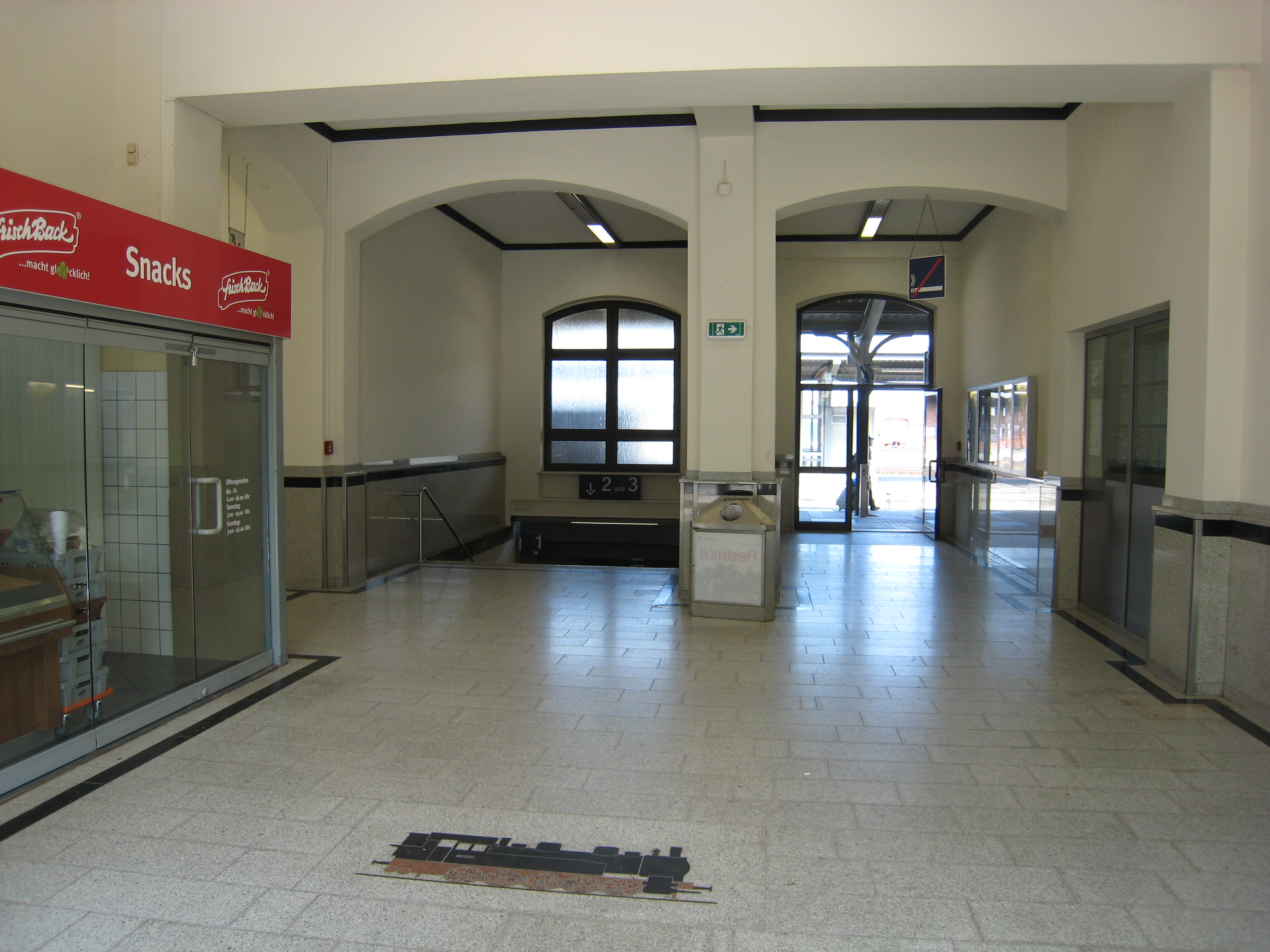 Hauptbahnhof Arnstadt Schalterhalle